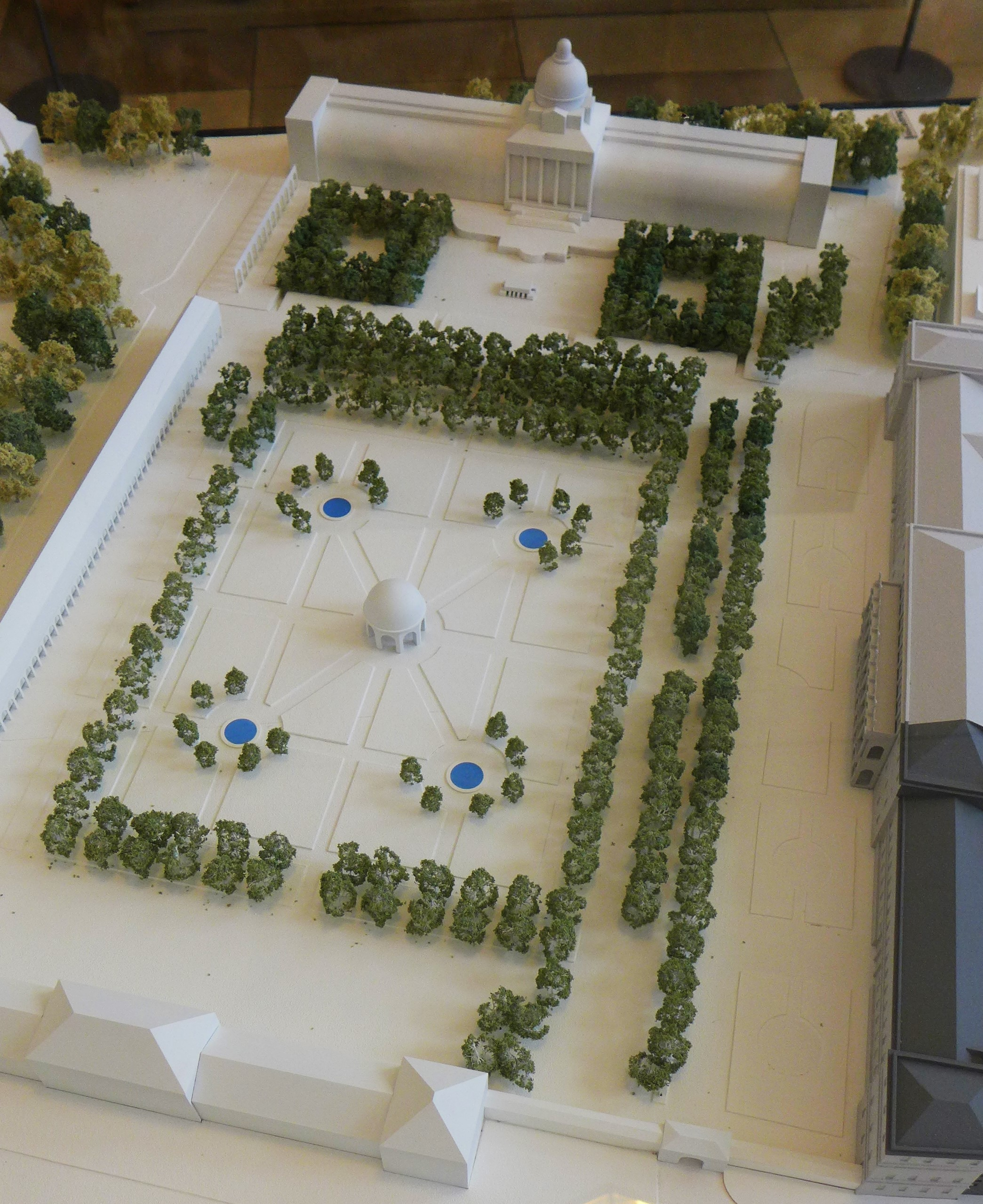 Architekturmodell der Bayerischen Staatskanzlei mit Hofgarten und Festsaalbau der Residenz (rechts), (Residenz München)